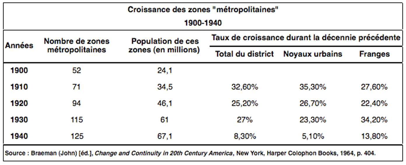 Illustration de la croissance des zones métropolitaines